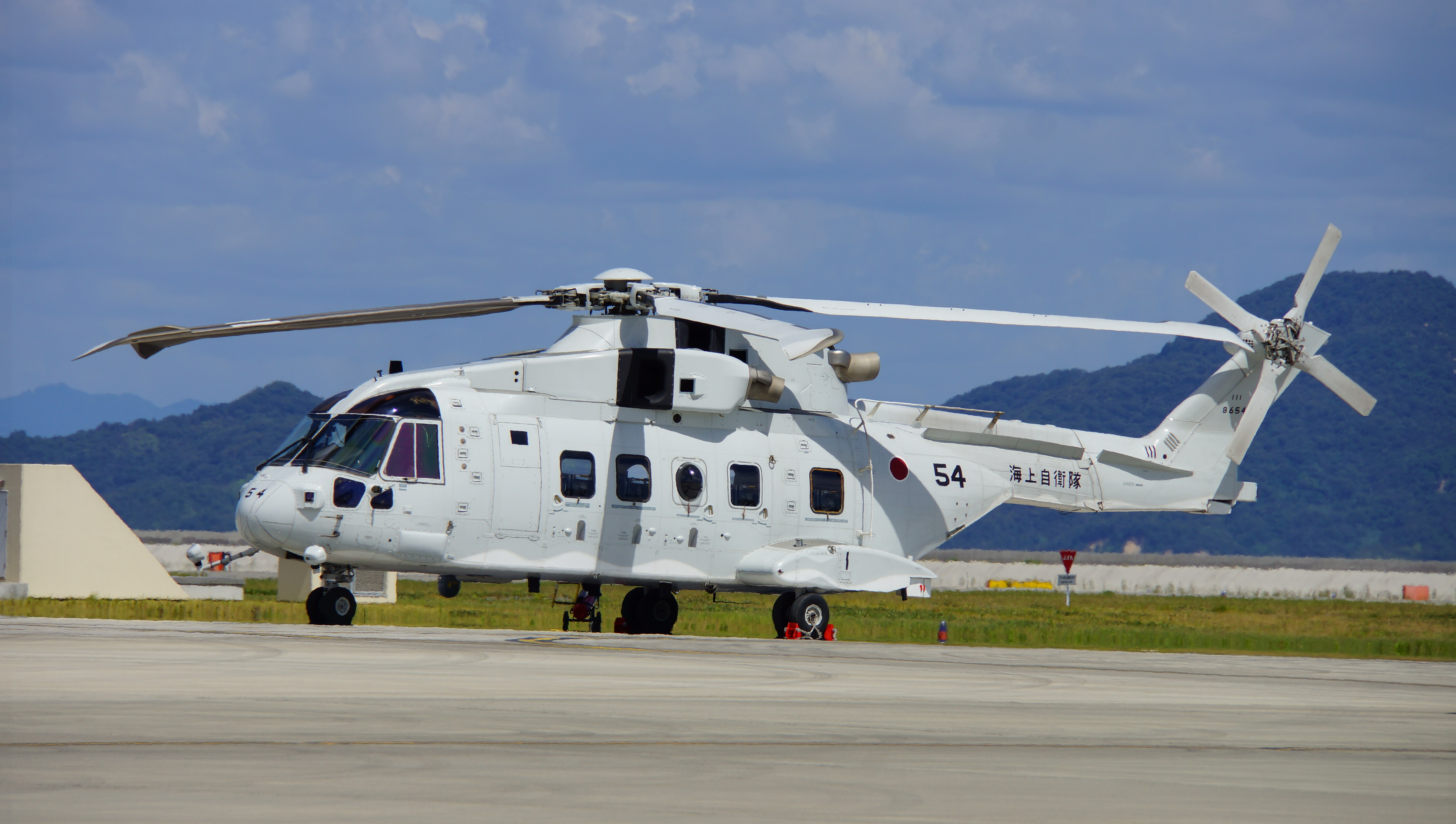 海上自衛隊 MCH-101掃海・輸送ヘリコプター（8654号機）。 14年9月14日 岩国航空基地にて。